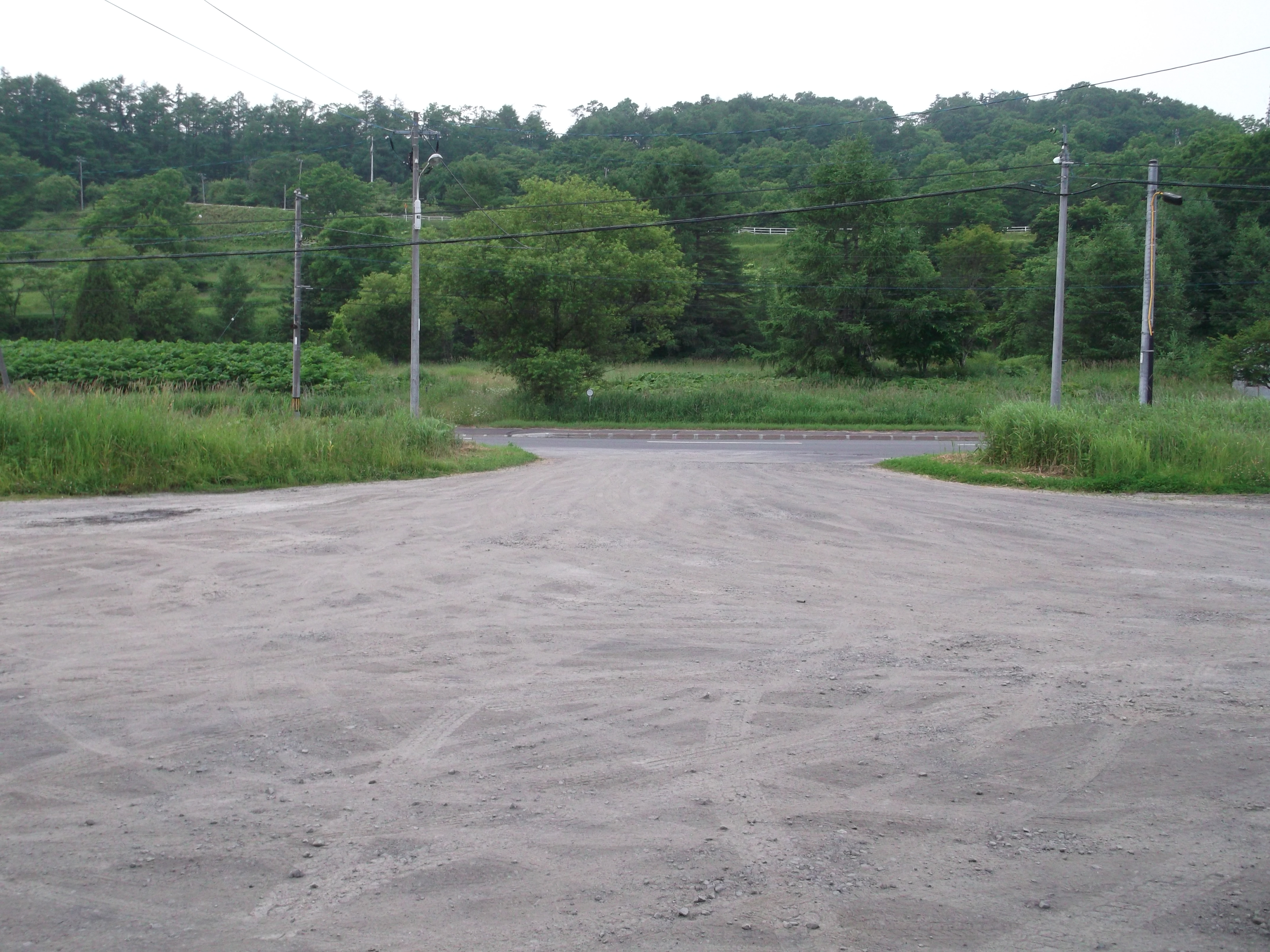 JR根室本線（花咲線）糸魚沢駅前 奥は国道44号線